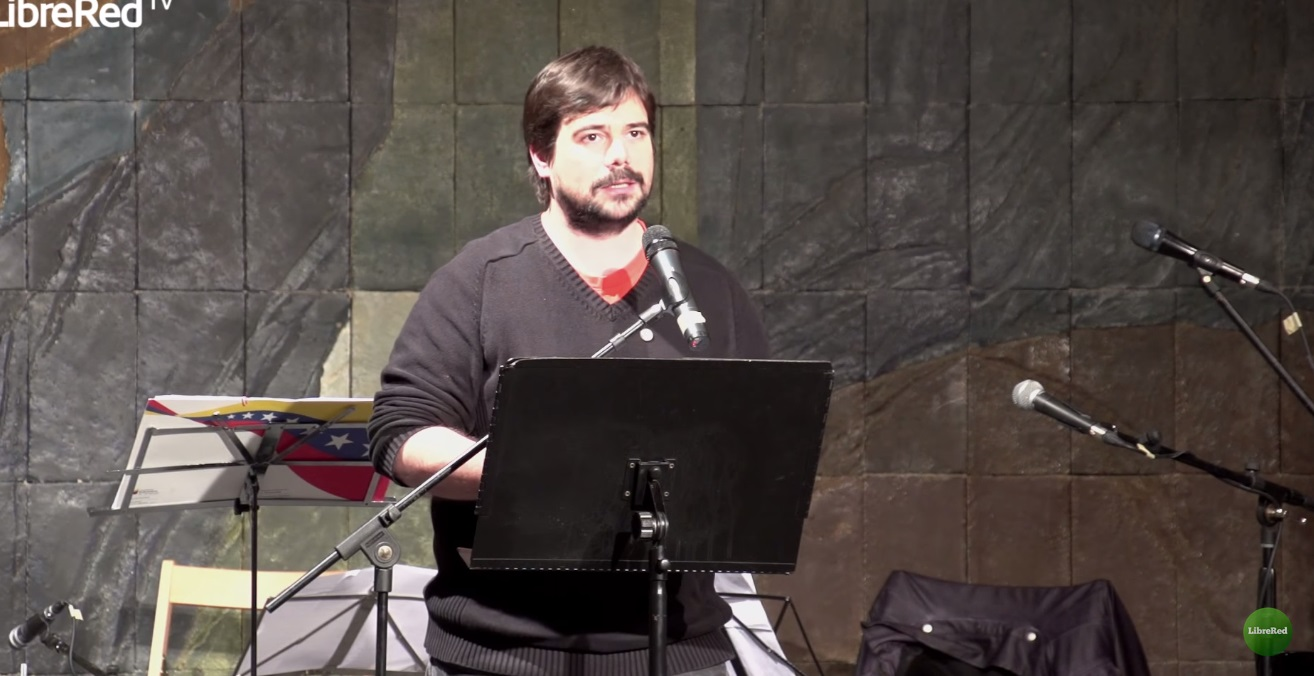 Ferran Nieto Gasull.